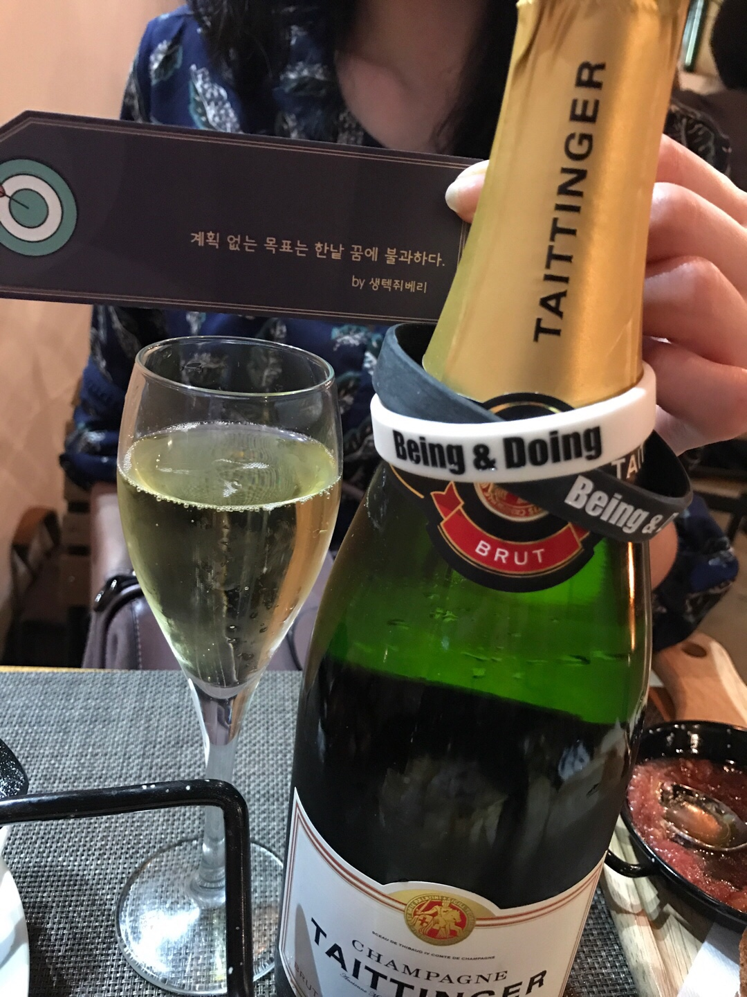 샴페인